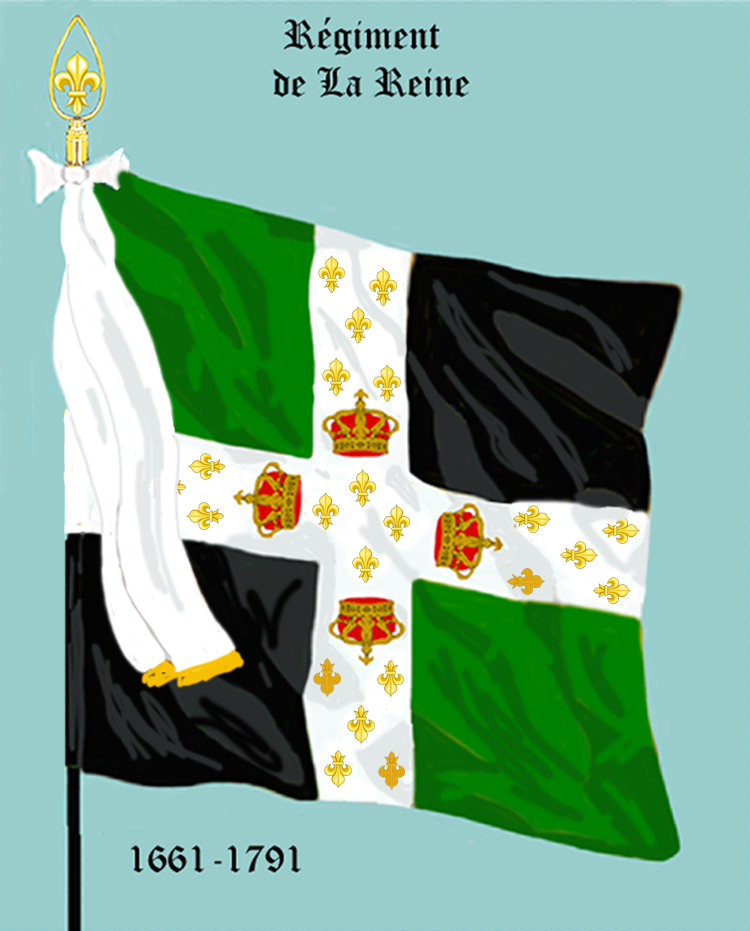 Ordonnanzfahne eines königlich französischen Infanterie-Regiments. - Entnommen und überarbeitet aus: „LES UNIFORMES ET LES DRAPEAUX DE L'ARMÉE DU ROI“ Marseille 1899. (Drapeau d'Ordonnance d' un régiment française d'infanterie royale.)